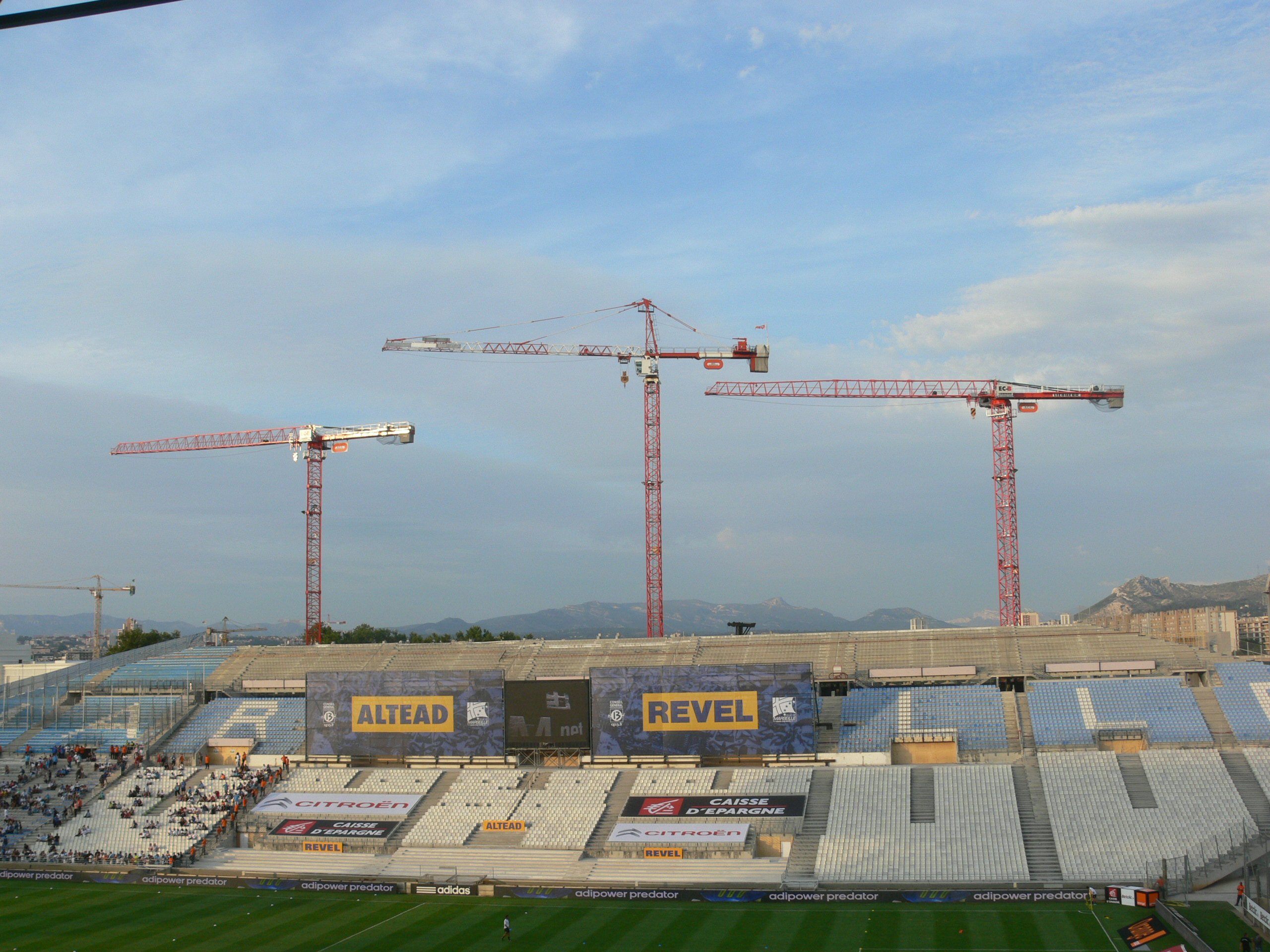 Tribune du stade vélodrome de Marseille faisant face à Jean-Bouin, alors en travaux, avant le match OM-Sochaux le 6 août 2011